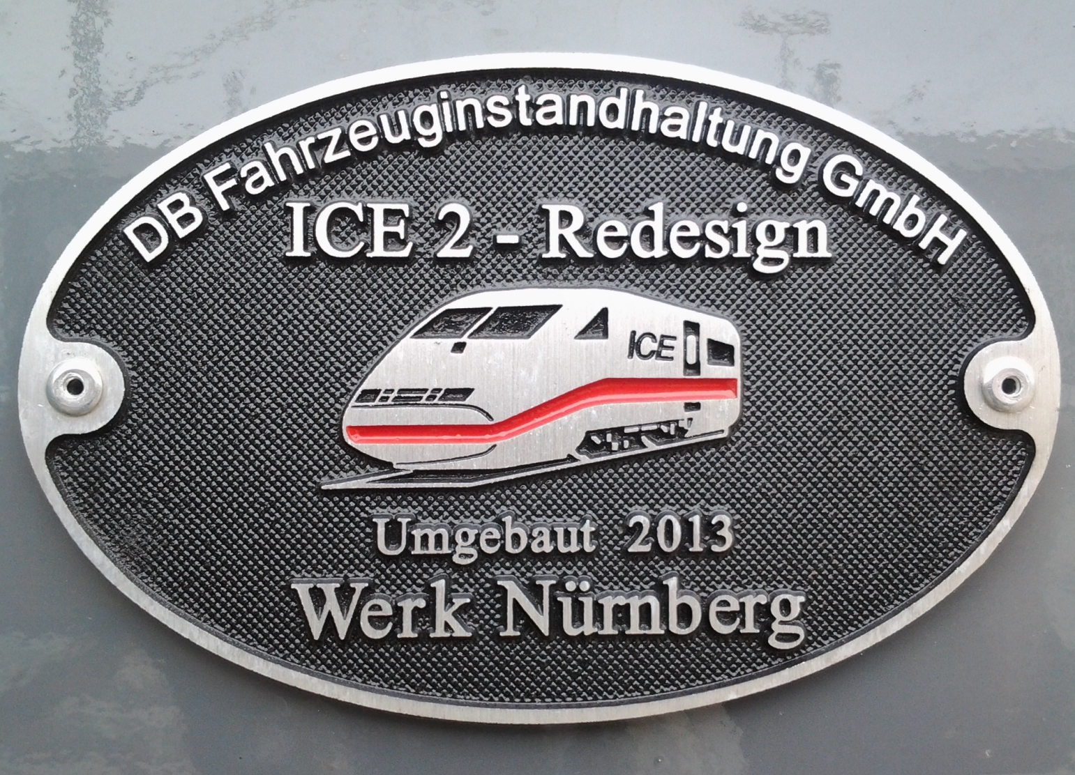 ICE 2 – Redesign Umbauschild der Deutschen Bahn – DB Fahrzeuginstandhaltung GmbH - Werk Nürnberg an einem ICE 2 Mittelwagen angebracht. Umgebaut 2013